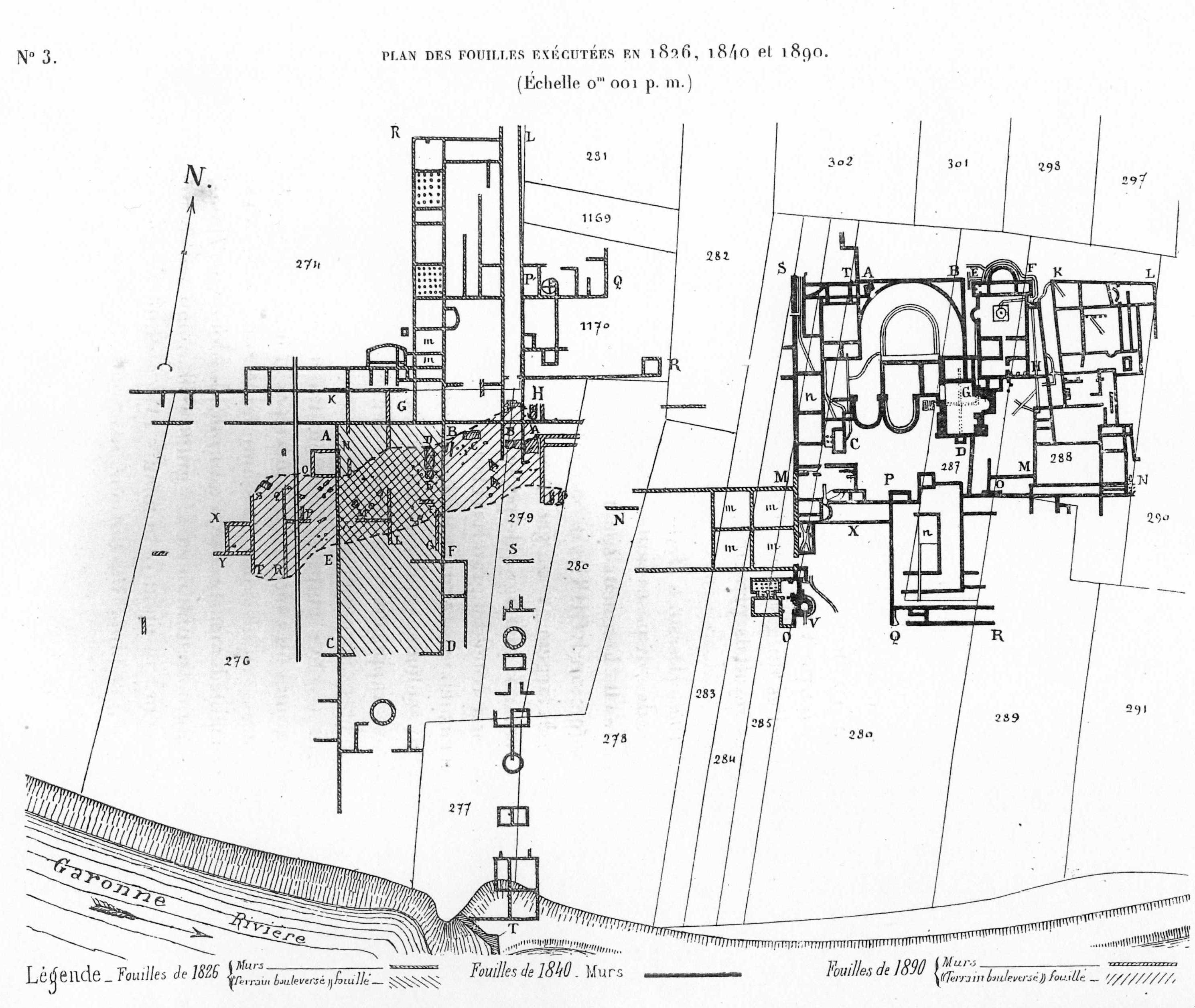 Plan des fouilles effectuées au XIX e sur le site de la villa de Chiragan